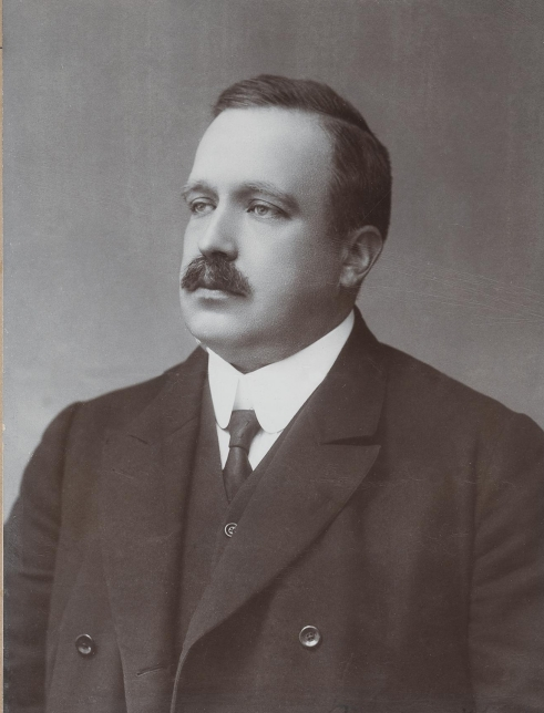 Alfons Vladimír Mensdorff-Pouilly (1864–1935)